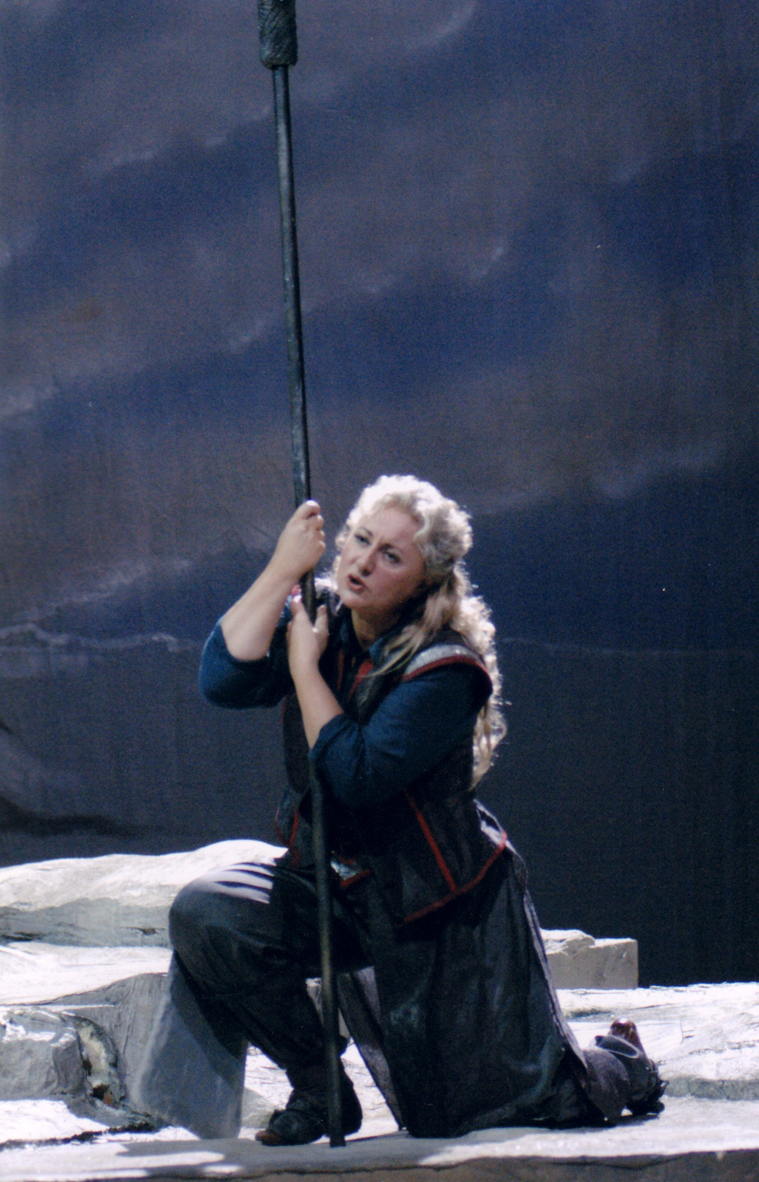 Gabriele Maria Ronge, Sopran